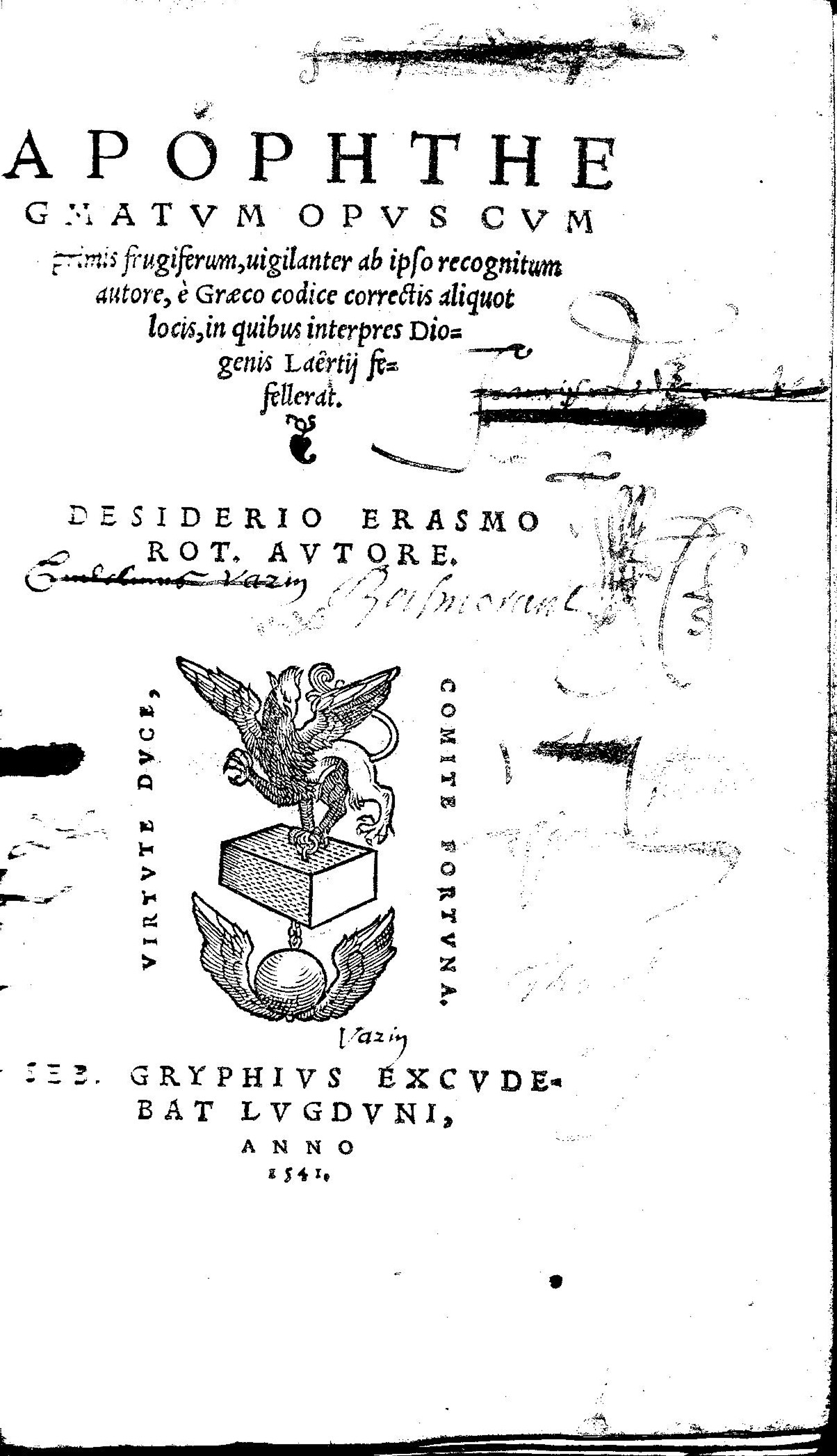 Apophthegmatum ex optimis utriusque linguae scriptoribus, édition de Lyon par Sebastien Gryphe.